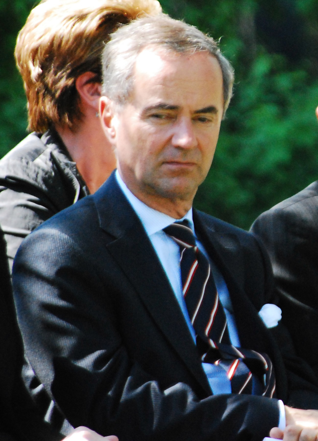 Hans Henning Blomeyer-Bartenstein bei der Bestattung von Opfern der NS-Medizin auf dem Wiener Zentralfriedhof (Gruppe 40)